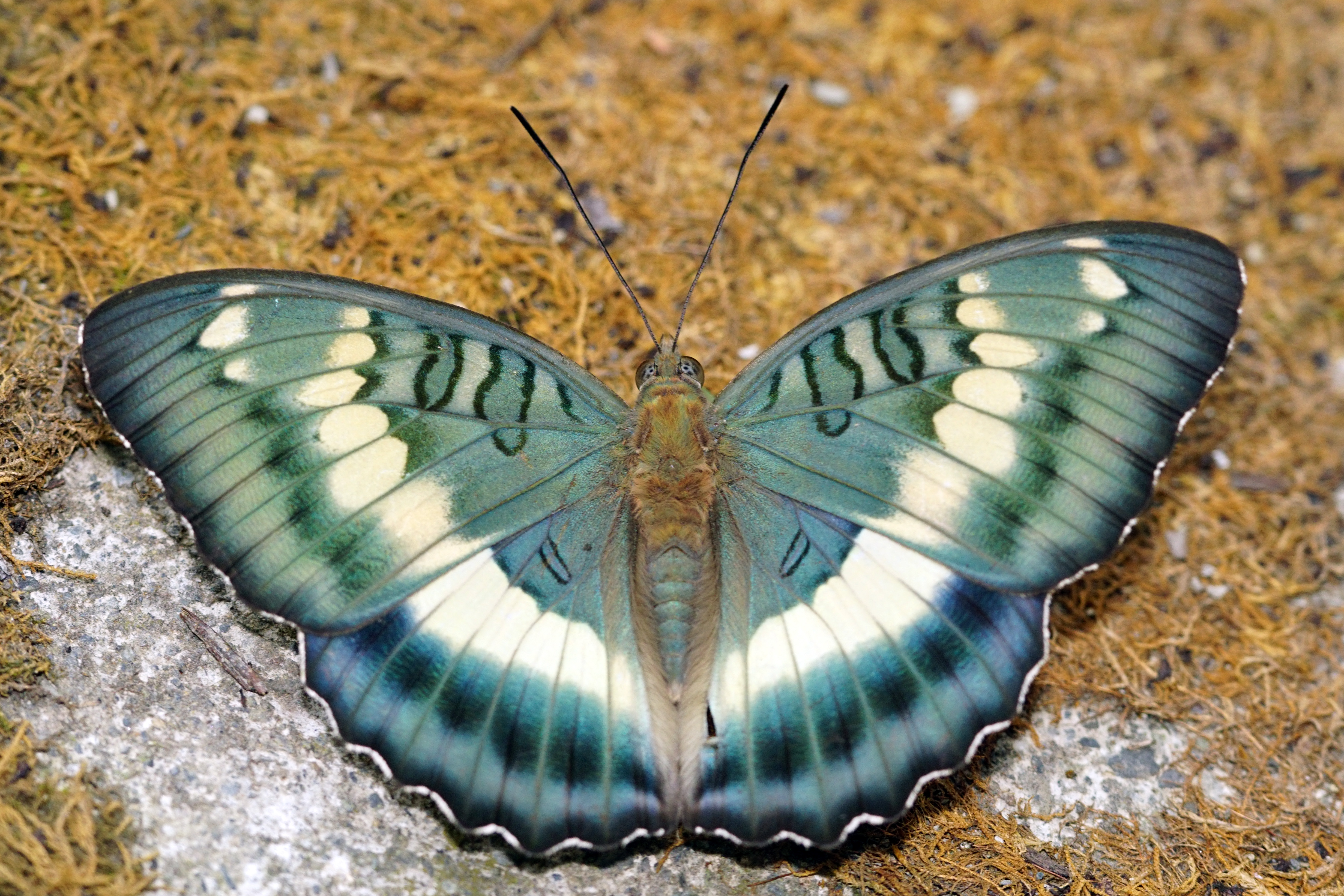 台灣翠蛺蝶